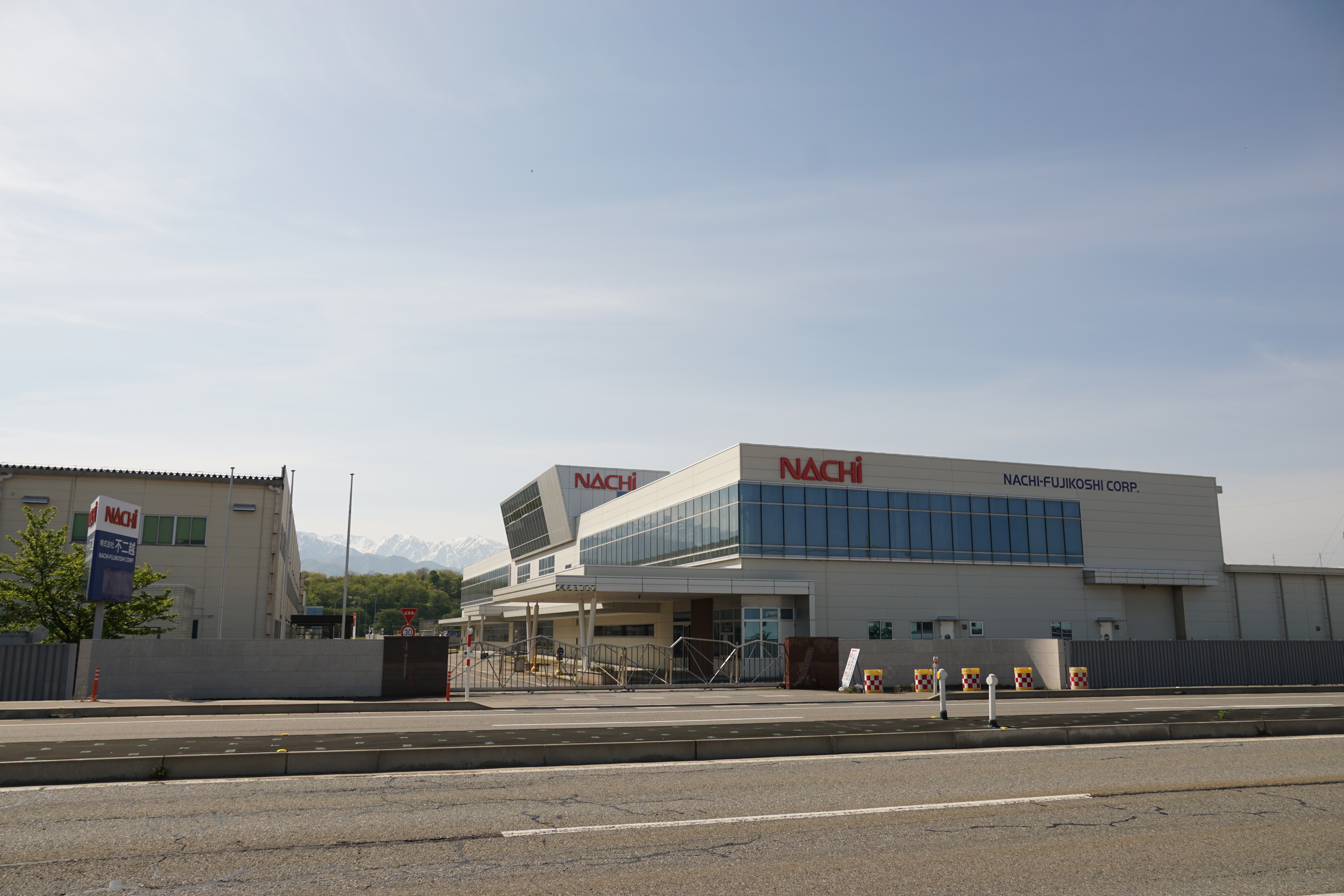 株式会社不二越の滑川事業所を国道8号線の向かいから撮影。